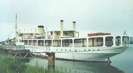 MS Liemba